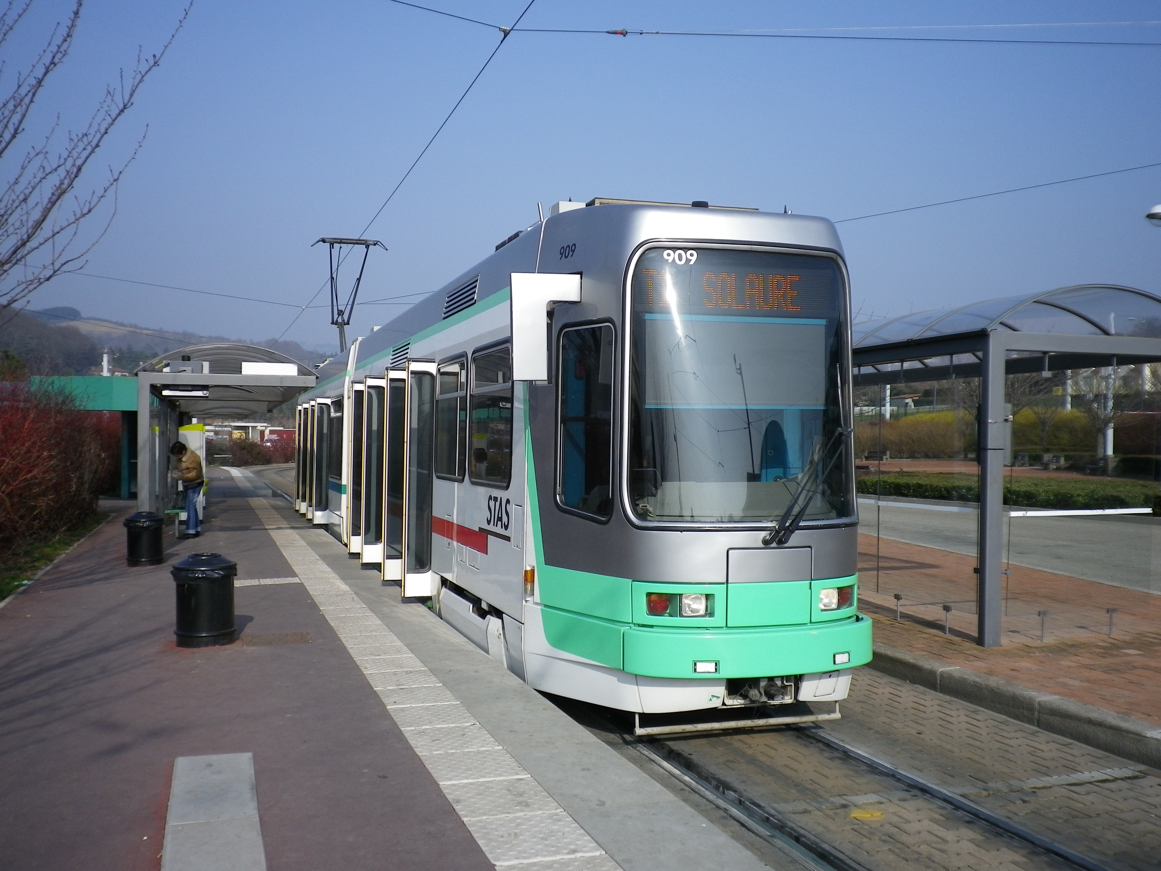 Vevey-Alsthom - Rame 909 du réseau STAS - Saint-Etienne. Photo prise au terminus de la ligne T1, Hôpital Nord.Pentax Optio H90